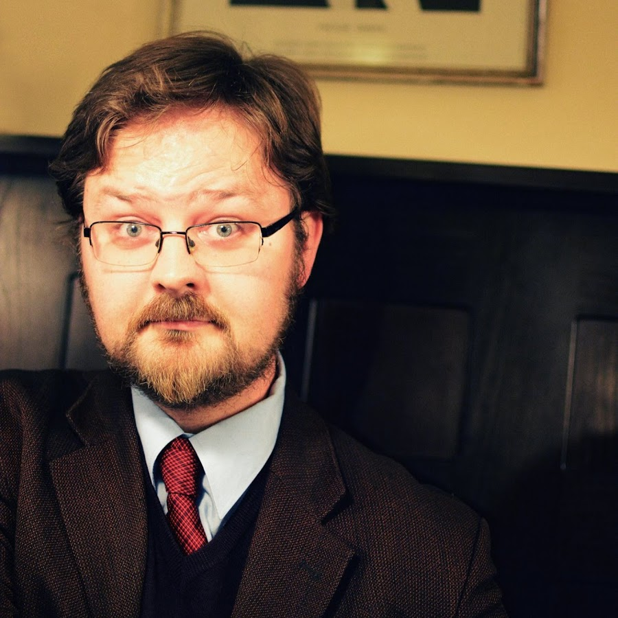 Přemysl Hnilička - knihovník, rozhlasový historik a publicista